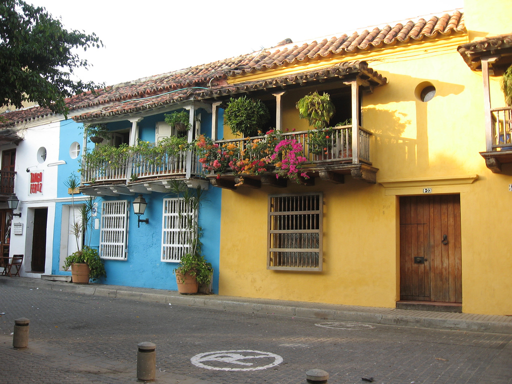 Cartagena, Colombia gennaio 2007